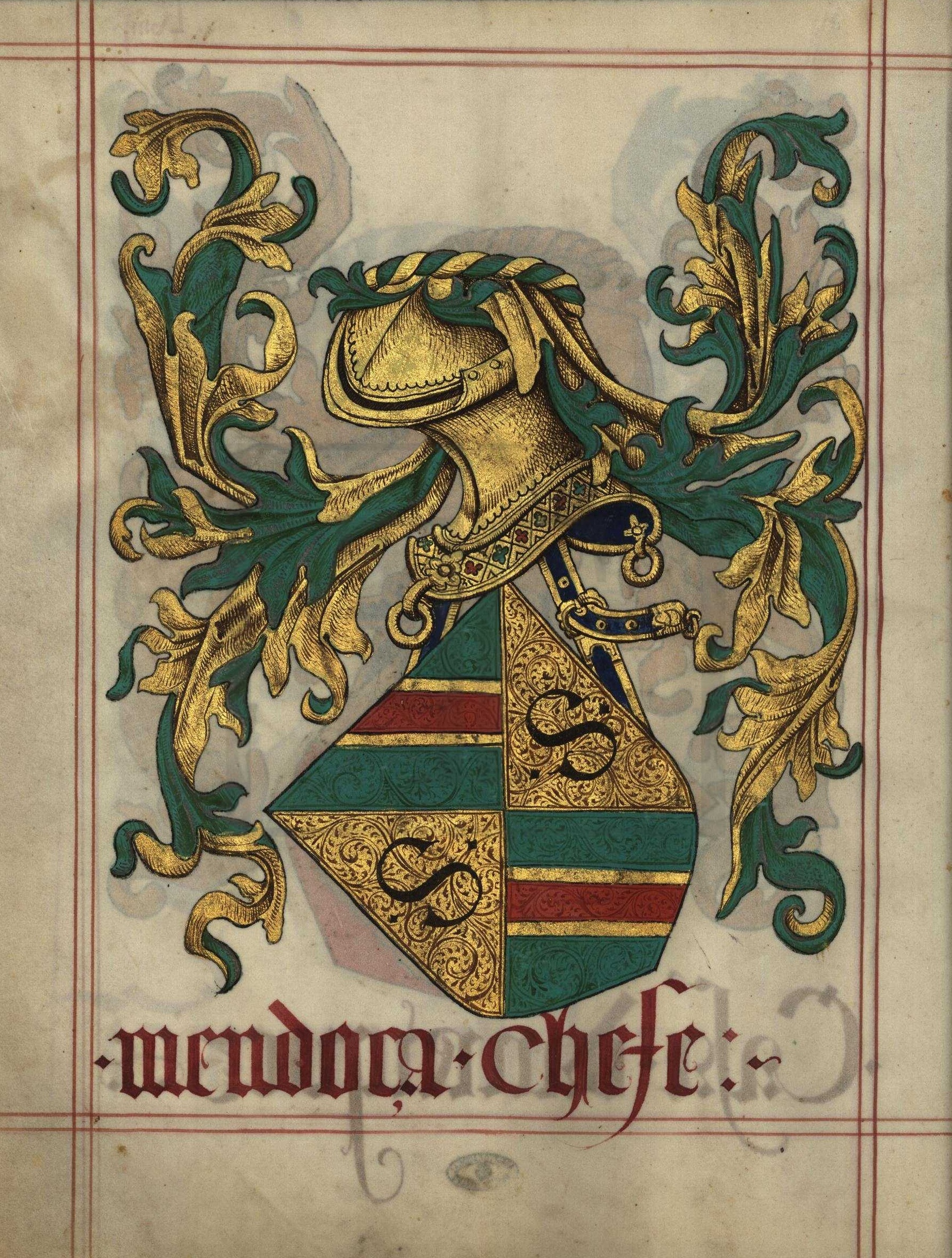 Livro do Armeiro-Mor, Mendonça (fl 59v)